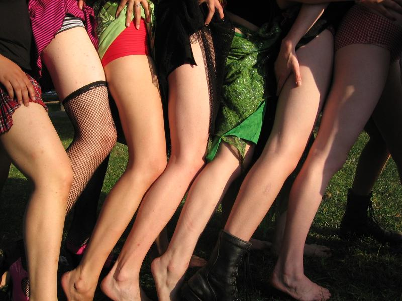 leggy legs